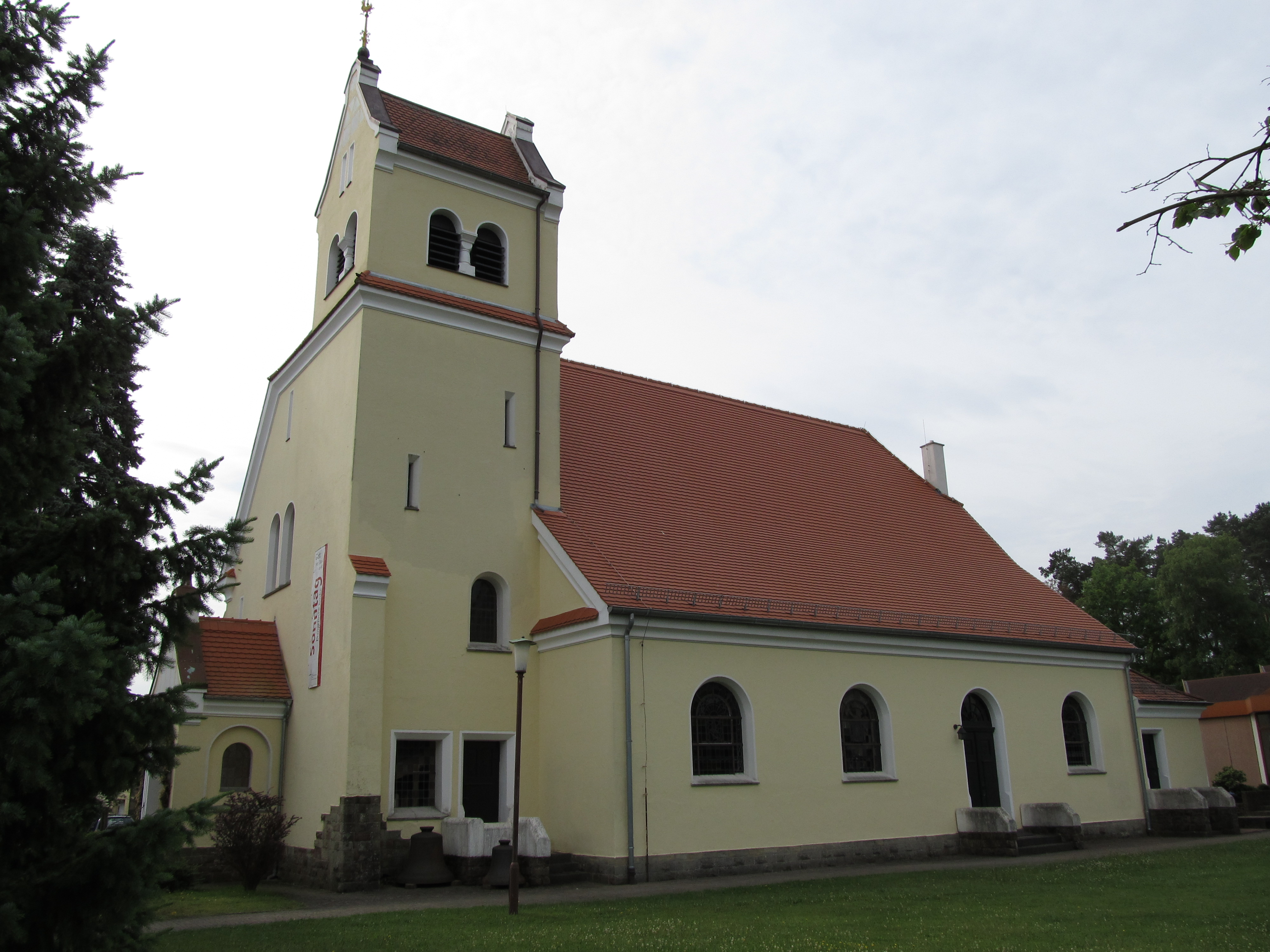 Blick auf die Protestantische Kirche in Hassel, Saarland